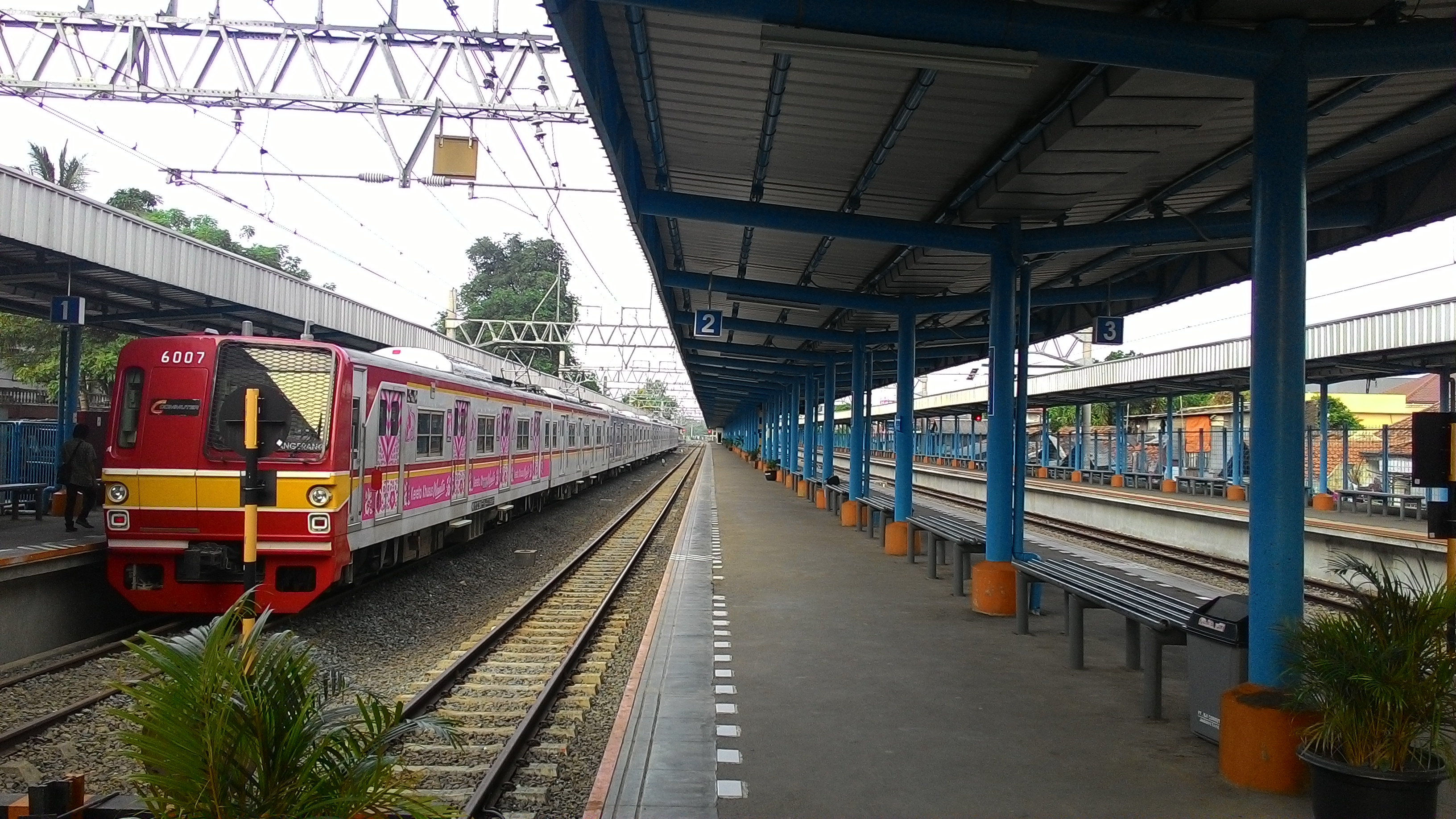 KA Commuter Jabodetabek sedang berhenti di Stasiun Tangerang, Mei 2015.